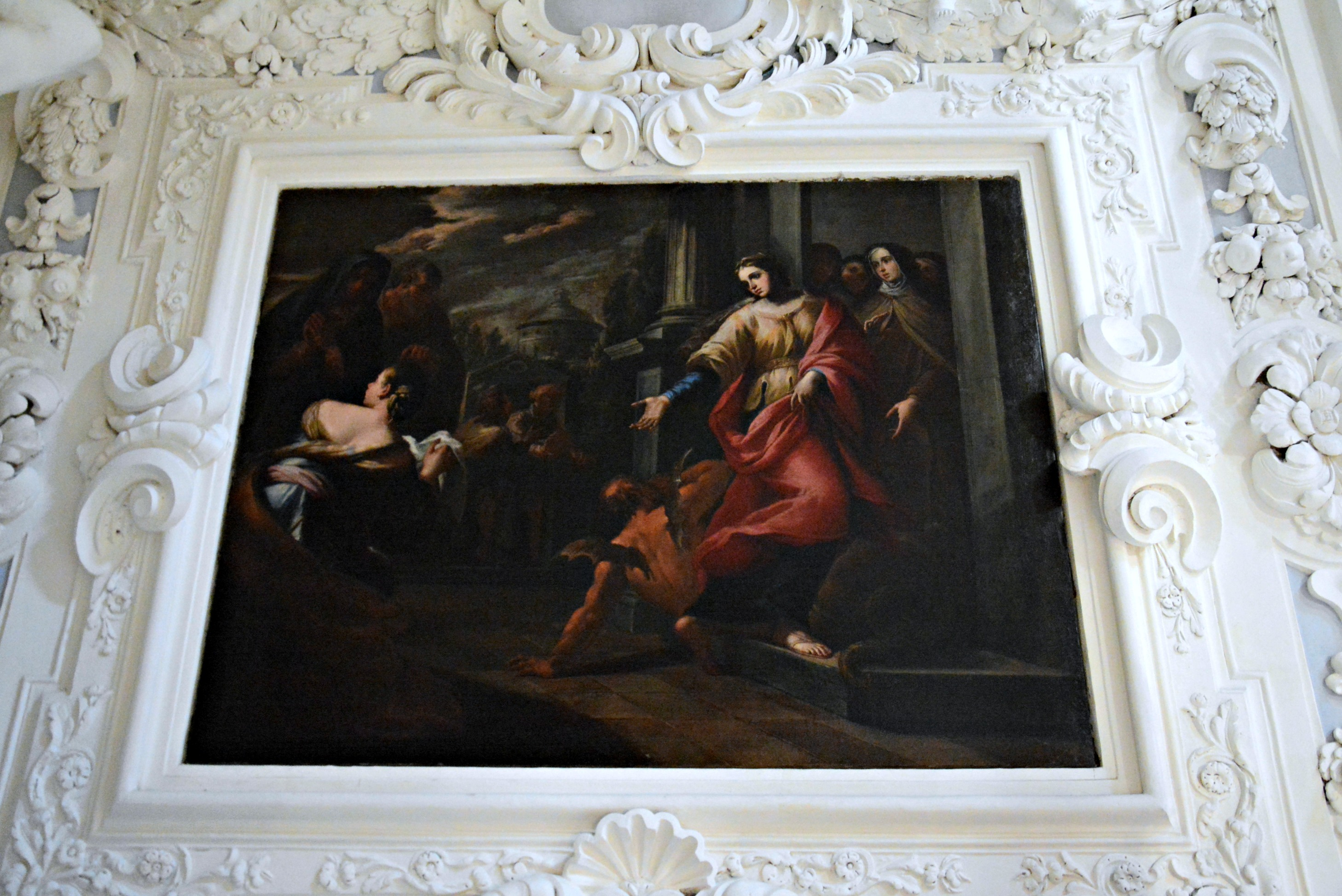 Vedi titolo